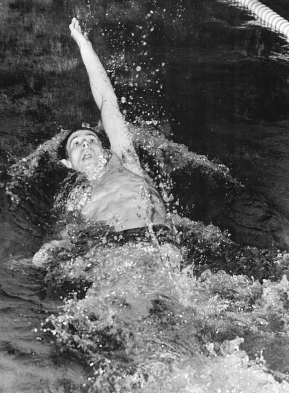 Roland Matthes Zentralbild Sindermann 13.4.1968 Rostock: Deutsche Hallenmeisterschaften der DDR-Sportschwimmer am 12. und 13.4.1968 (1.Tag) Sieger über 200 m Rücken wurde Roland Matthes (SC Turbine Erfurt) in 2:06,4 min. Diese Zeit lag sogar unter dem Weltrekord, doch werden Bestzeiten auf 25 m Bahnen nicht offiziell anerkannt.